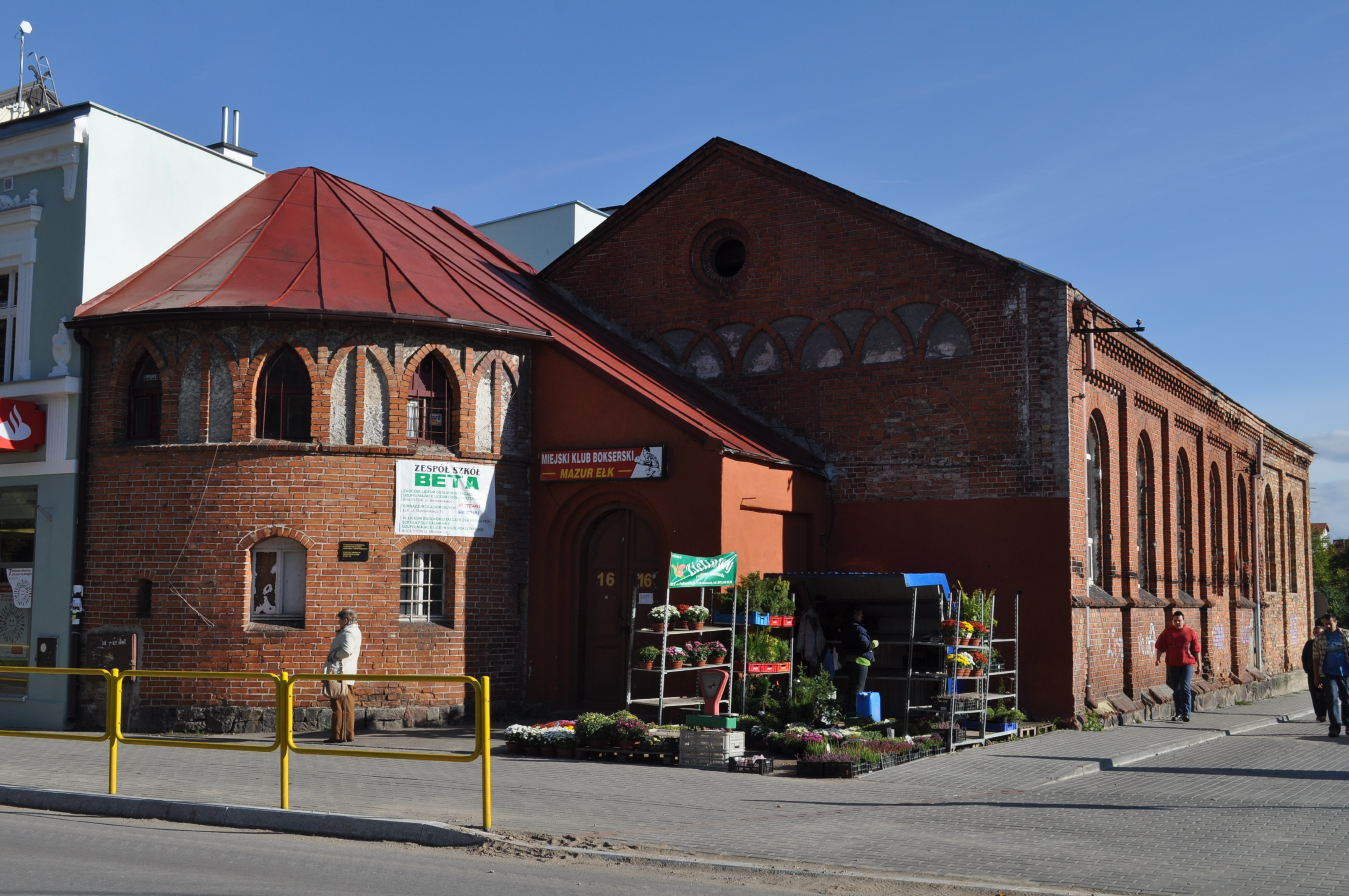 bryła budynku sali sportowej widok od ulicy Armii Krajowej